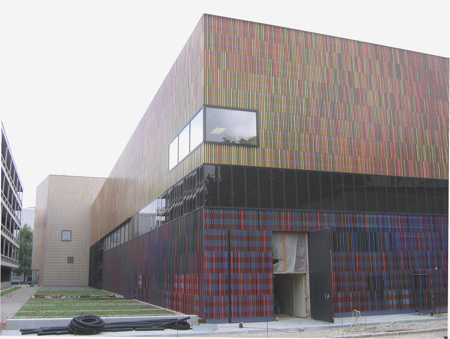 Museum Brandhorst, München, kurz vor Fertigstellung (8. Juni 2008)